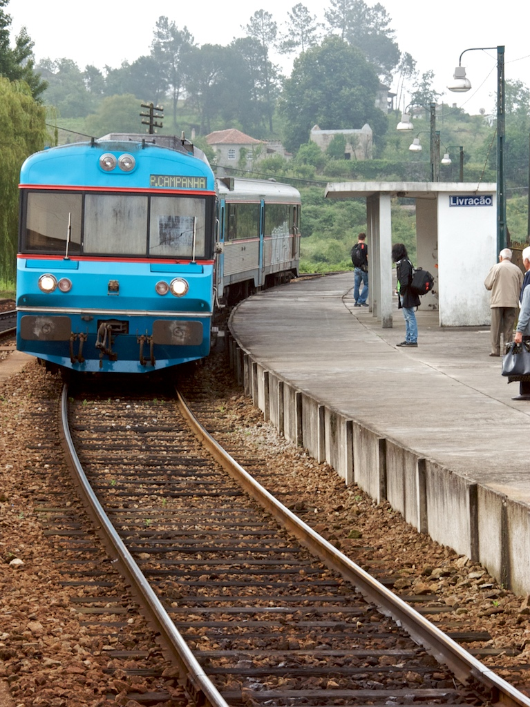 a bordo do InterRegional 861. Tipo: Comboio InterRegional 862 [Régua - Porto • Campanhã] Local: Estação de Livração [Linha do Douro, PK 55] Data e hora: 17 de Junho de 2008 [08h20] Material: Automotora 04xx [Unidade Dupla Diesel]